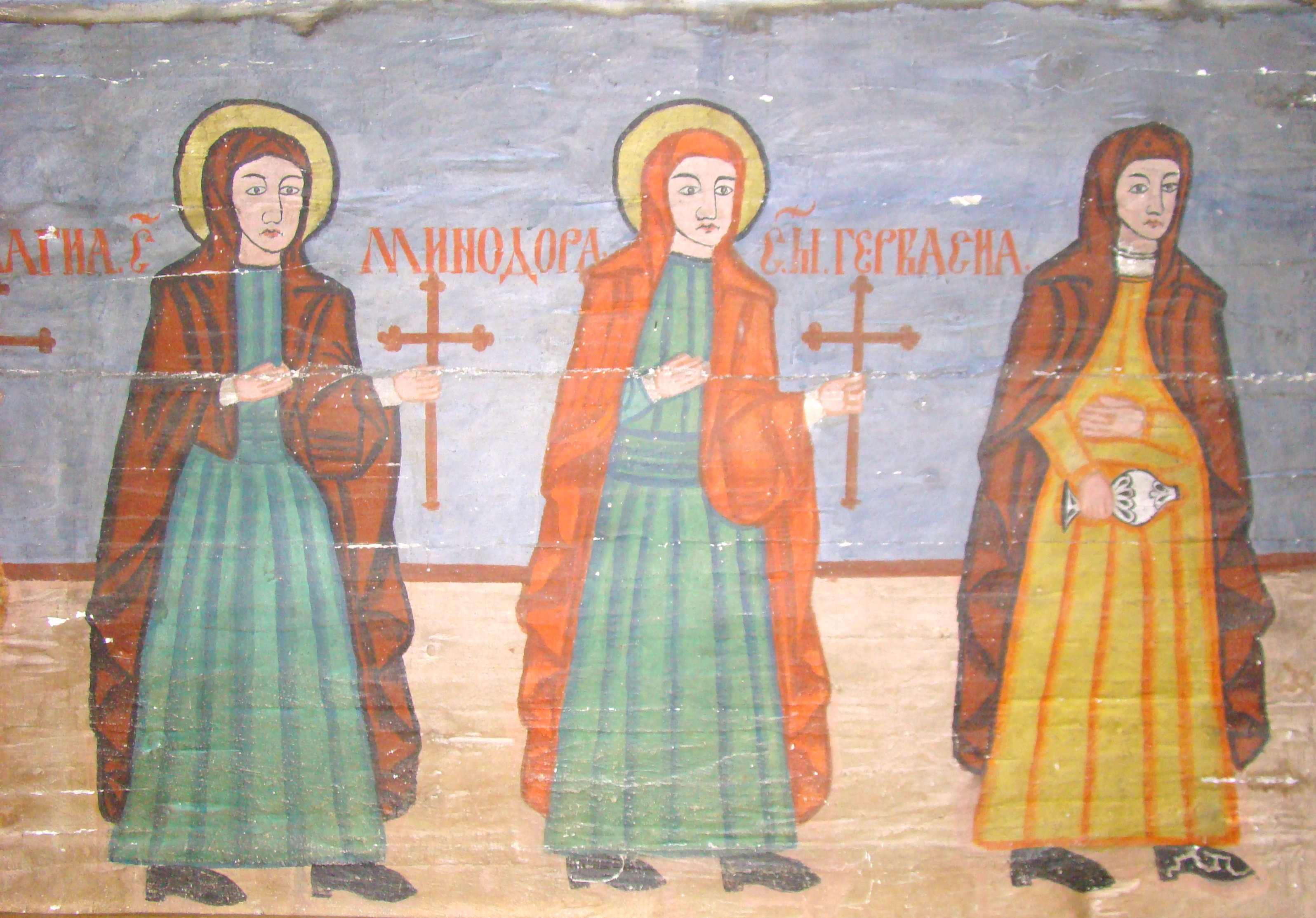 Biserica de lemn „Sfinții Arhangheli” din Ocolișel, județul Cluj